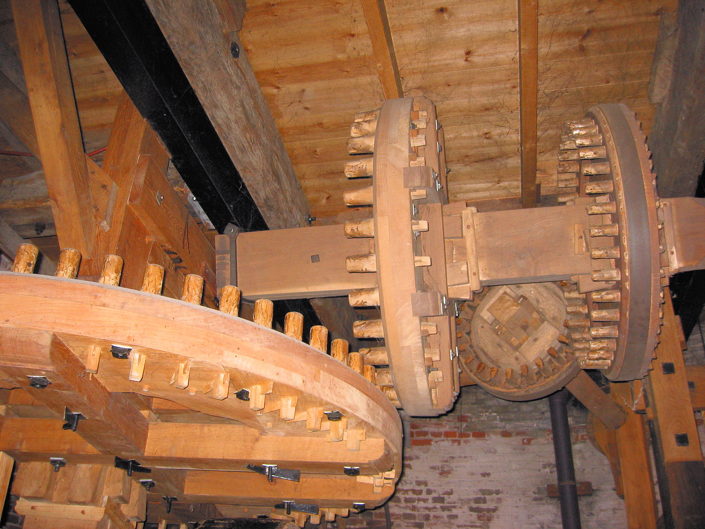 Holten's Molen wentelas, Deurne, the Netherlands